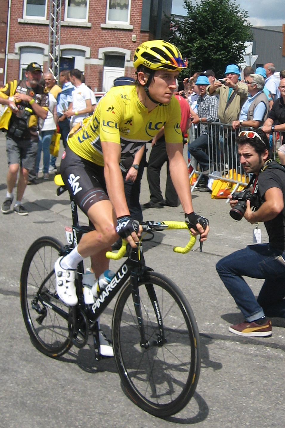 Start in Verviers (België) van de 3e etappe van Le Tour de France 2017.